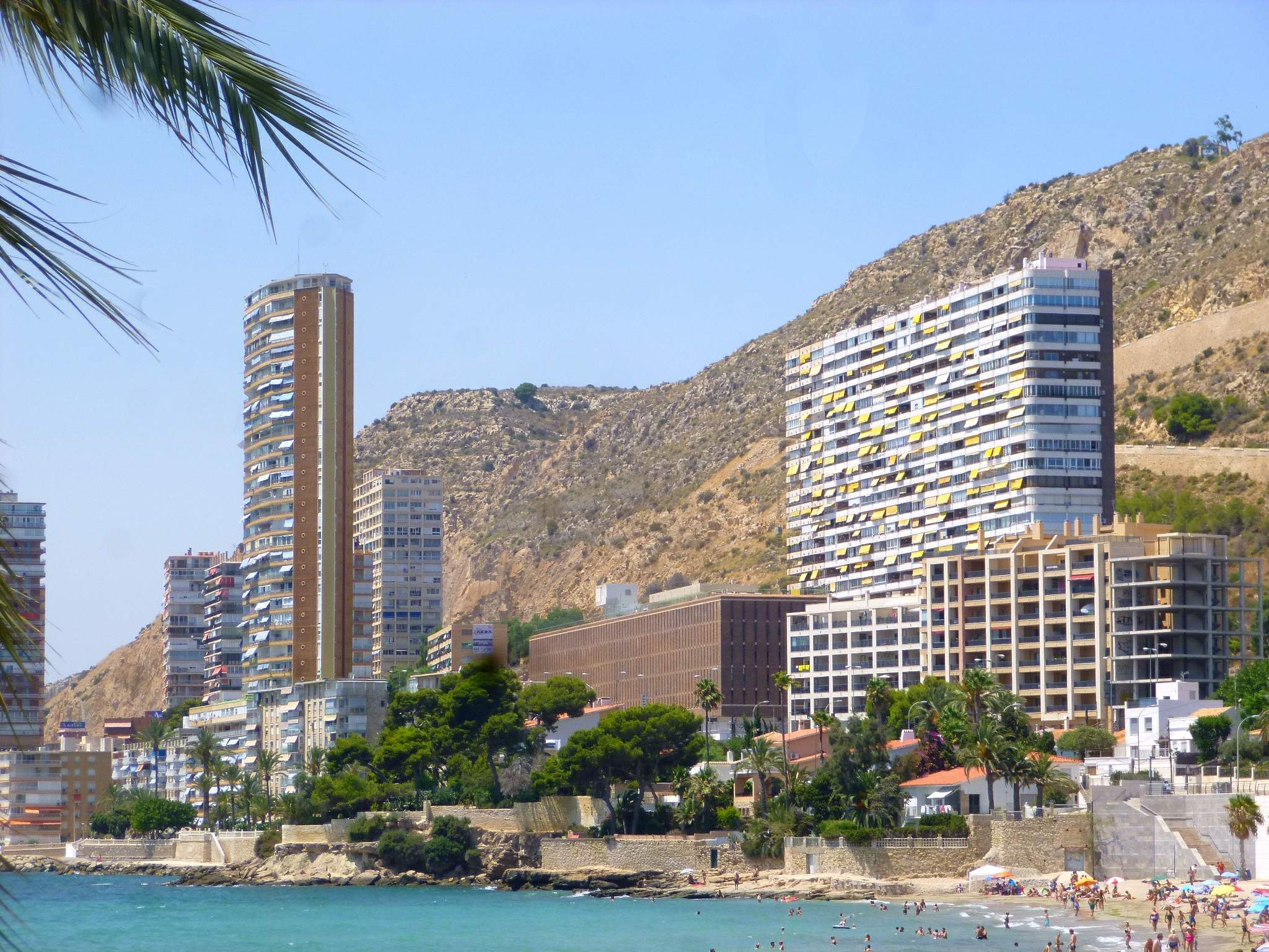 Alicante - Playa de la Albufereta, Torre Vistamar y Residencial Monte y Mar